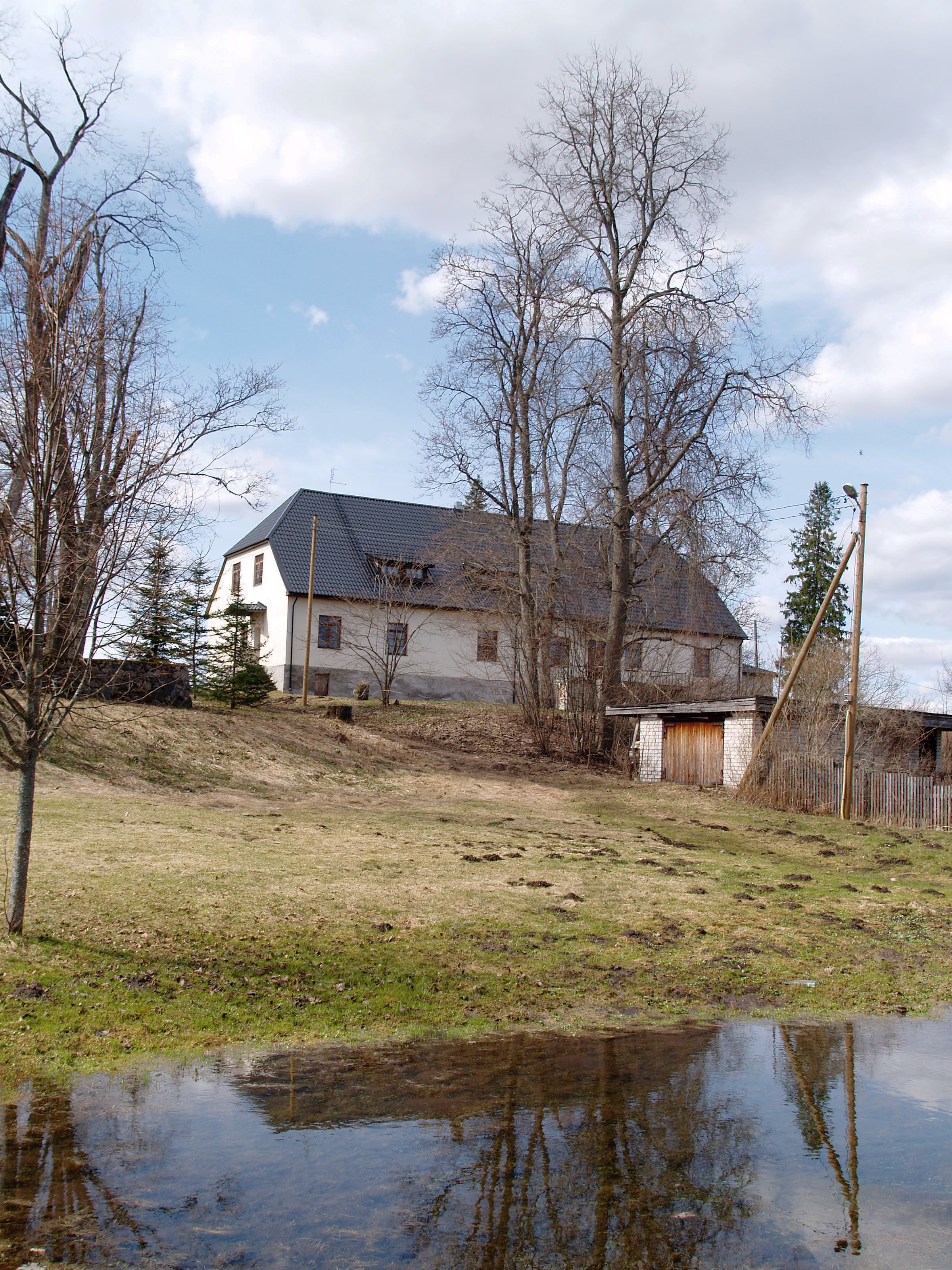 Kose pastoraat